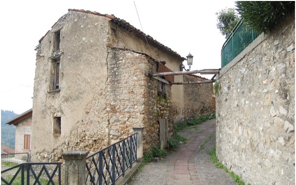 Casa di Teresa Oliverio, sorella maggiore di Maria. Fu in questa casa che Ciccilla uccise la sorella con 48 colpi di scure (Archivio Centrale dello Stato, ROma, Tribunali Militari Straordinari, Busta 80)